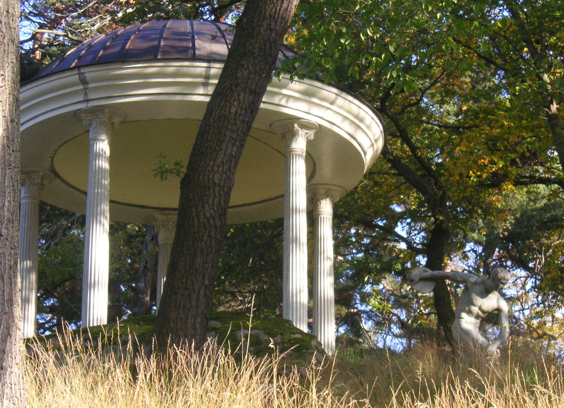 Ecotempet vid Villa Fridhem, Ålkistan, Stockholm